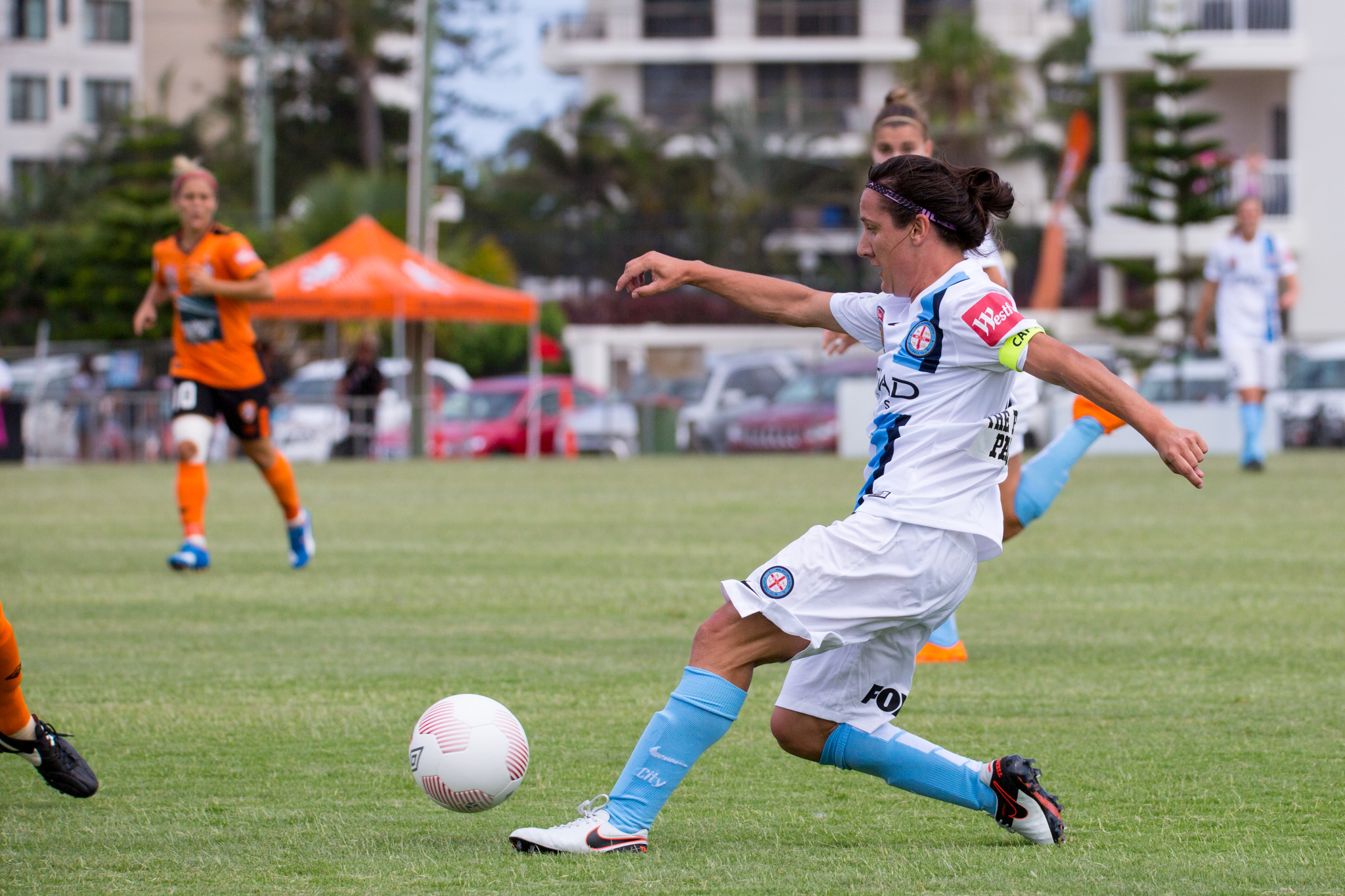 Lisa De Vanna